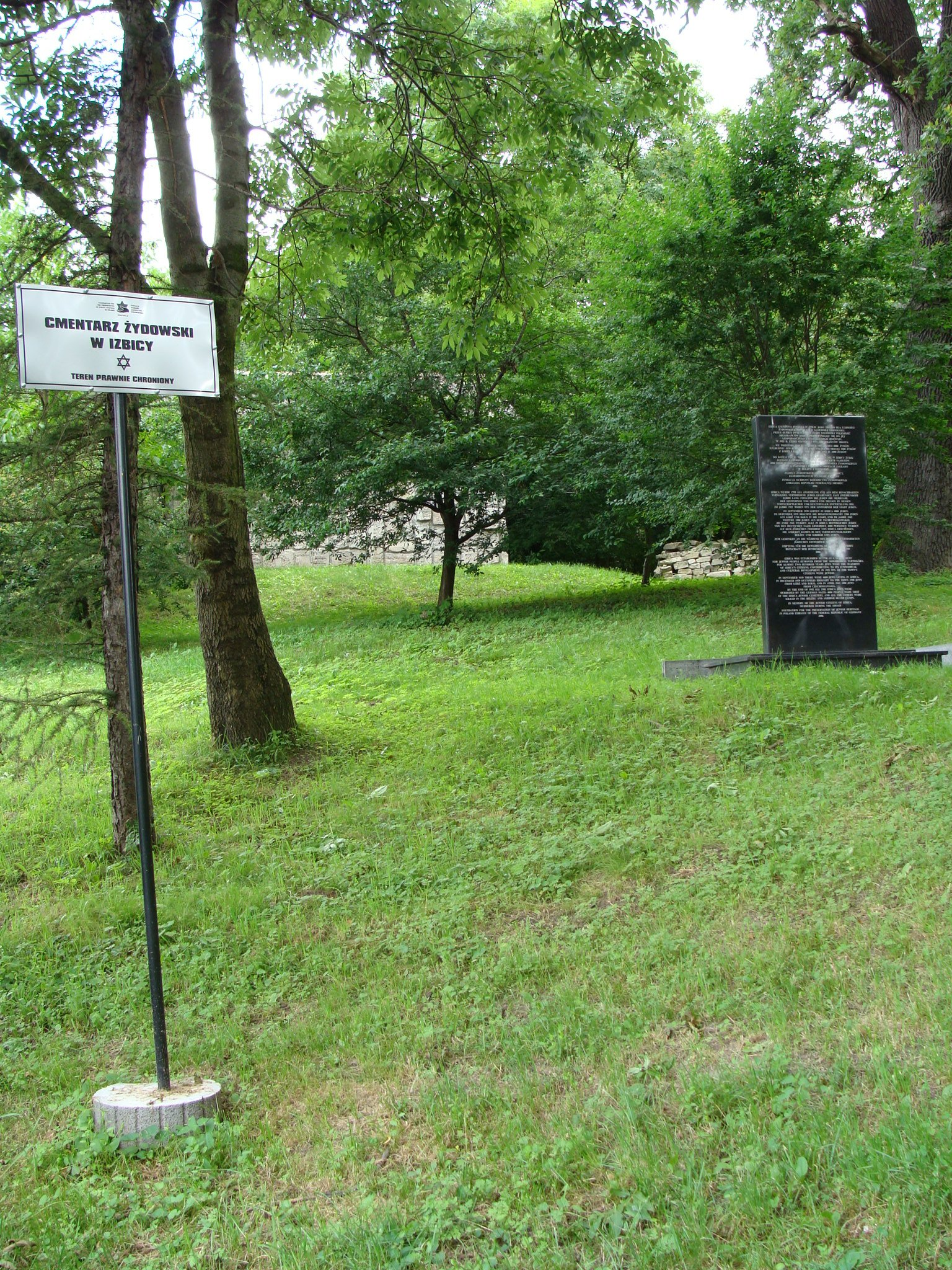 Kirkut w izbicy